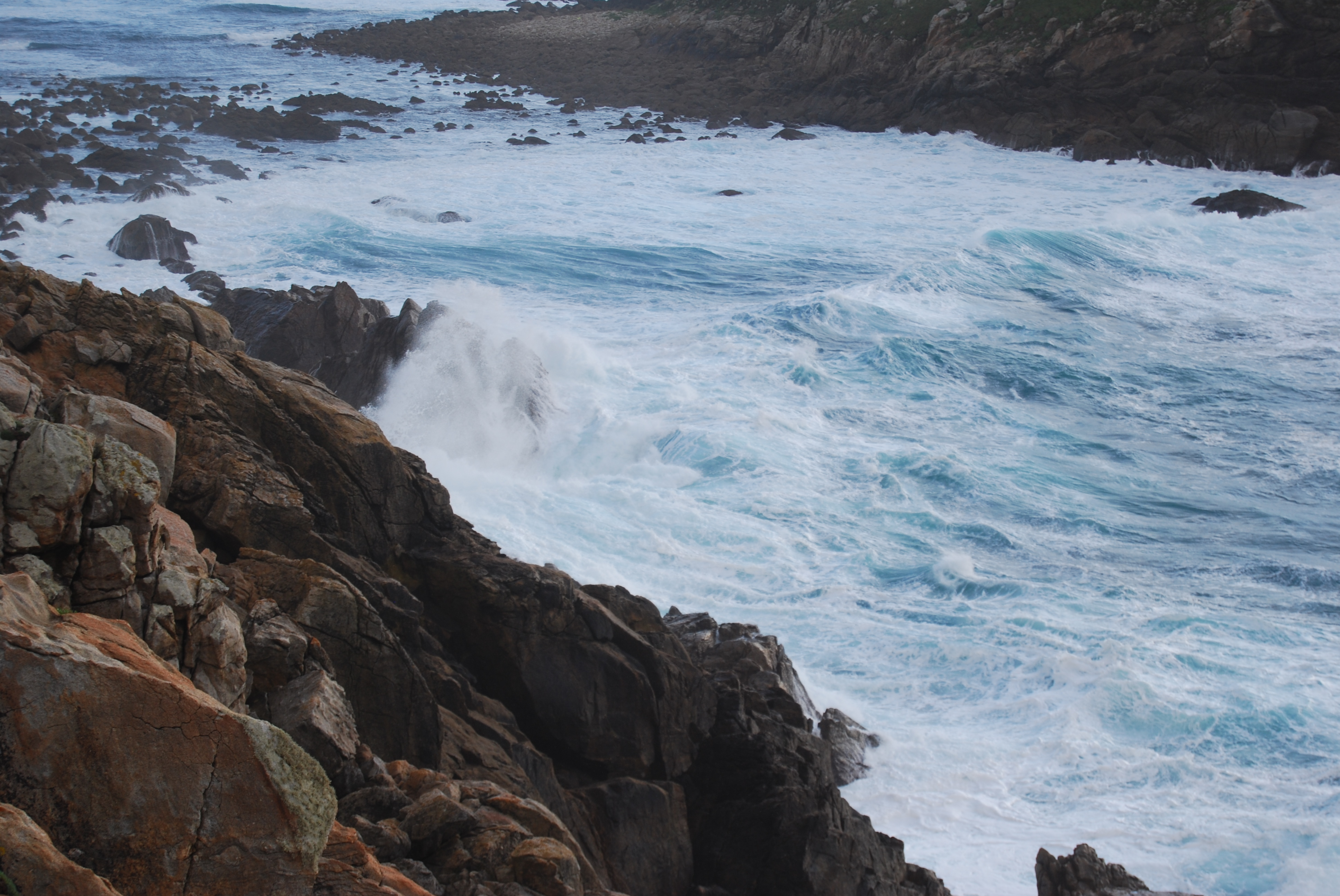 Costa da Morte - Galicia